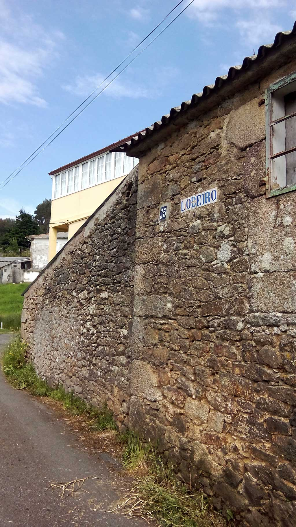 Lodeiro.